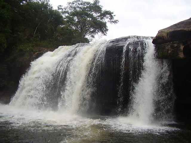 Essa é a cachoeira do Chuvisco, de Santo Antônio do Rio Abaixo.